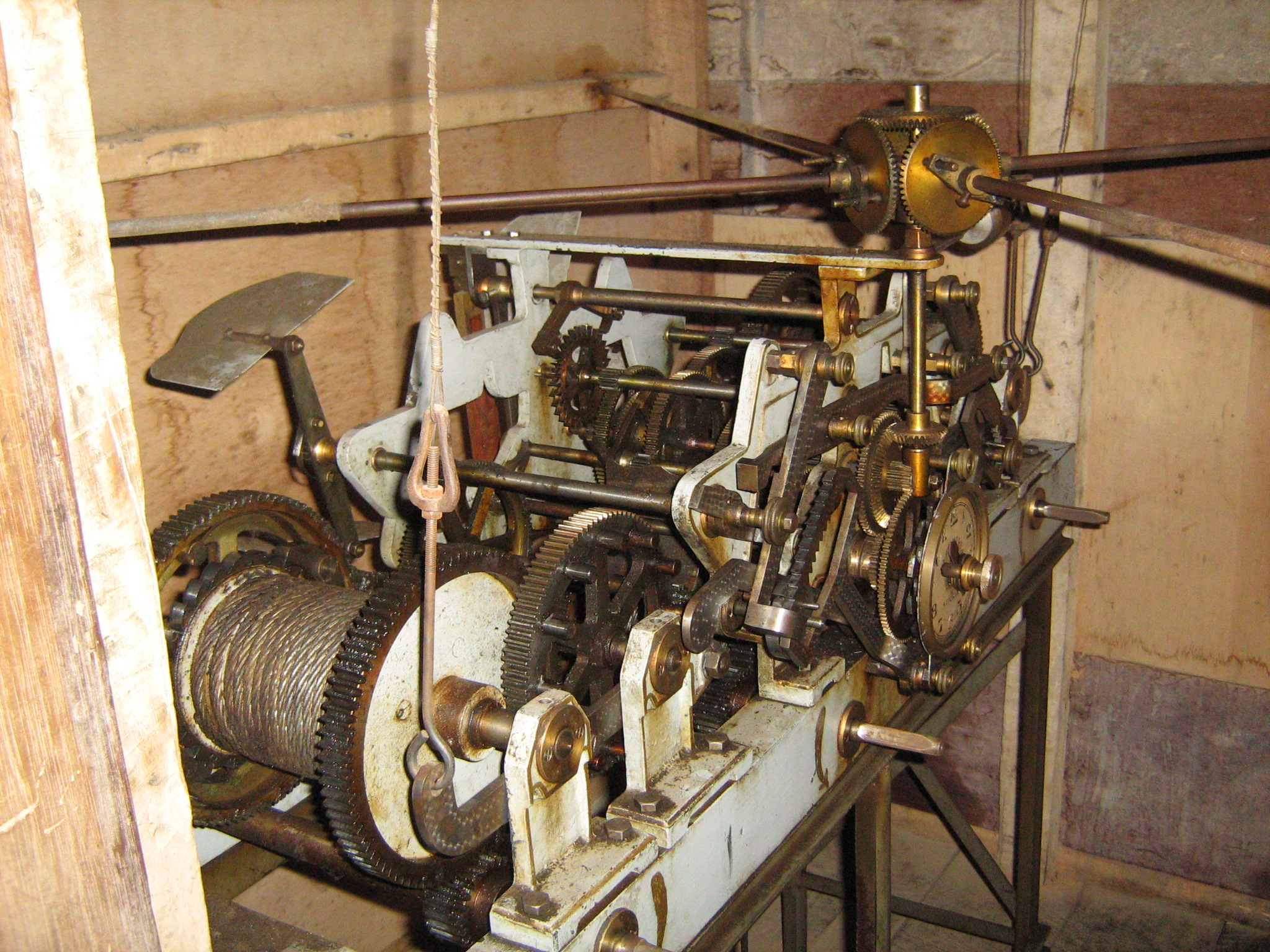 Mecanismo del Reloj de la Basílica de Yarumal, Antioquia, Colombia.